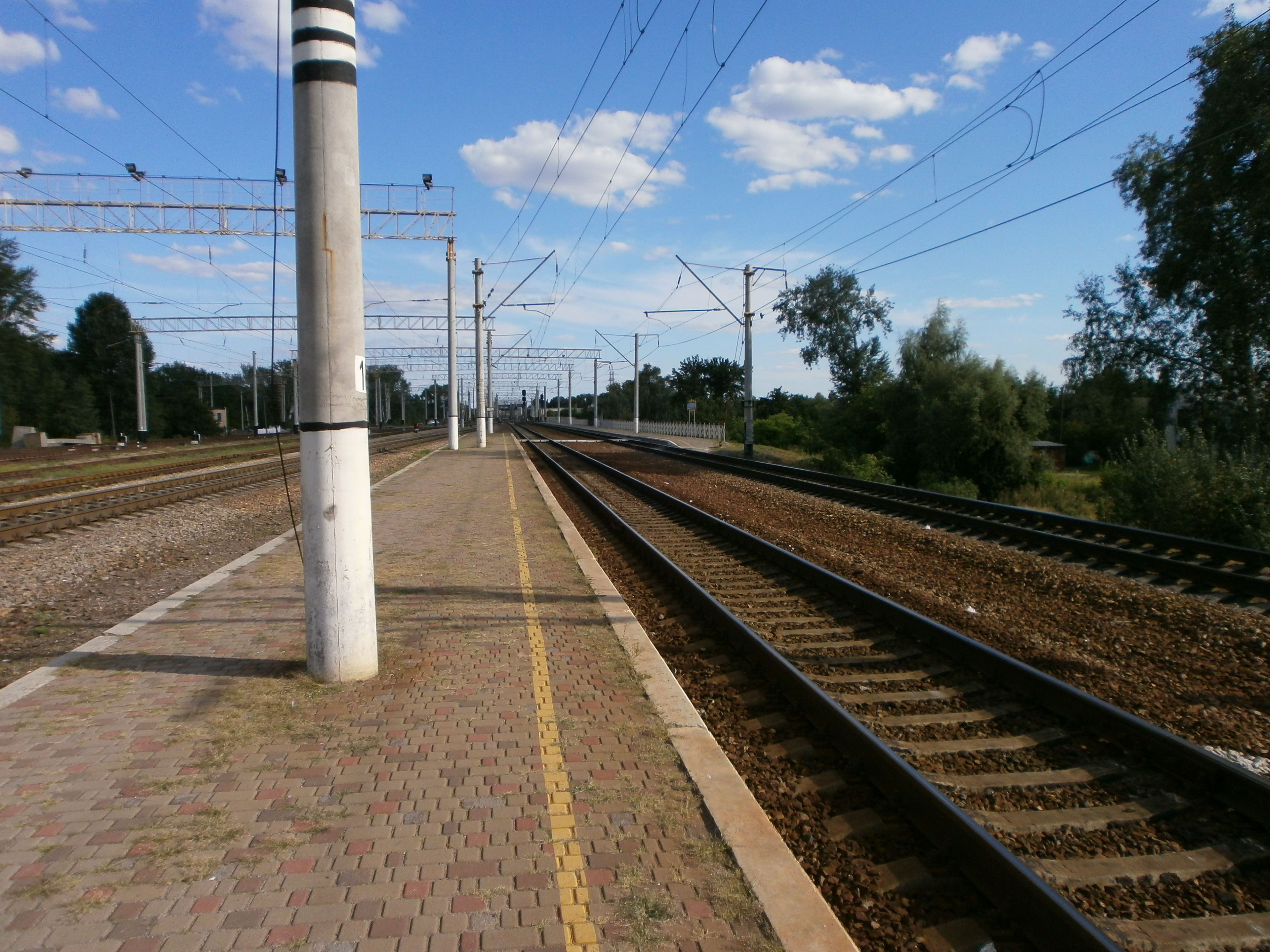 З. п. Пост-Ворскла біля Полтави